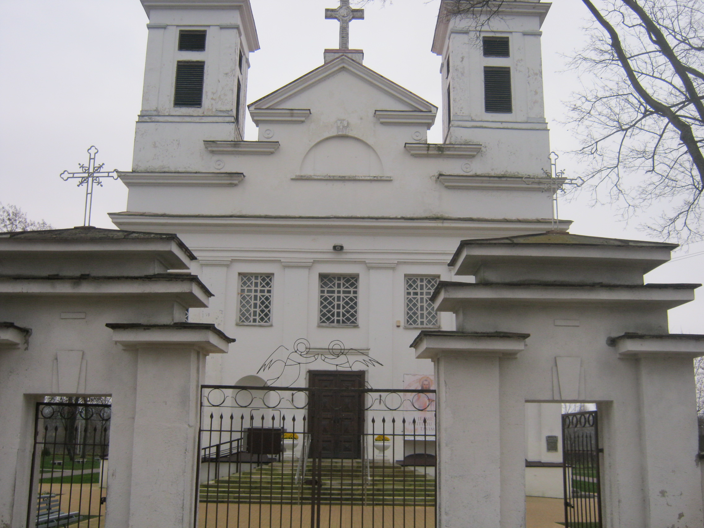 Jonava